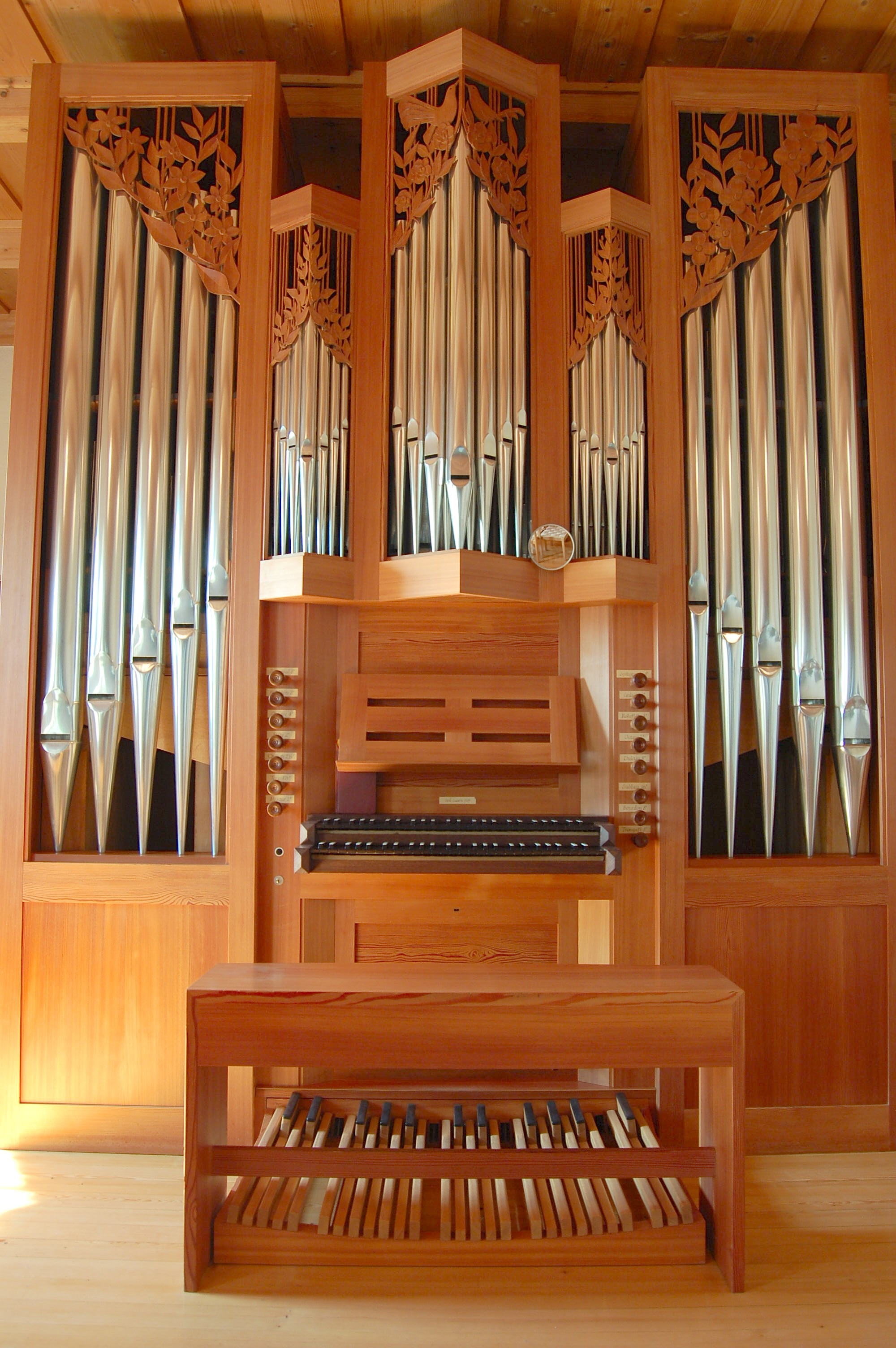 Goll-Orgel in der der Dorfkirche Gerzensee, eingeweiht 1989